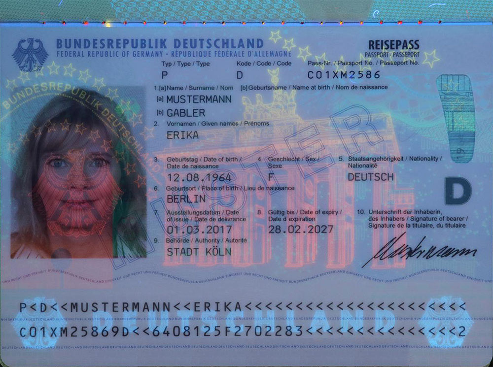 Passkartendatenseite des deutschen Reisepasses von Erika Mustermann (Muster 2017), beleuchtet mit UV-Licht.